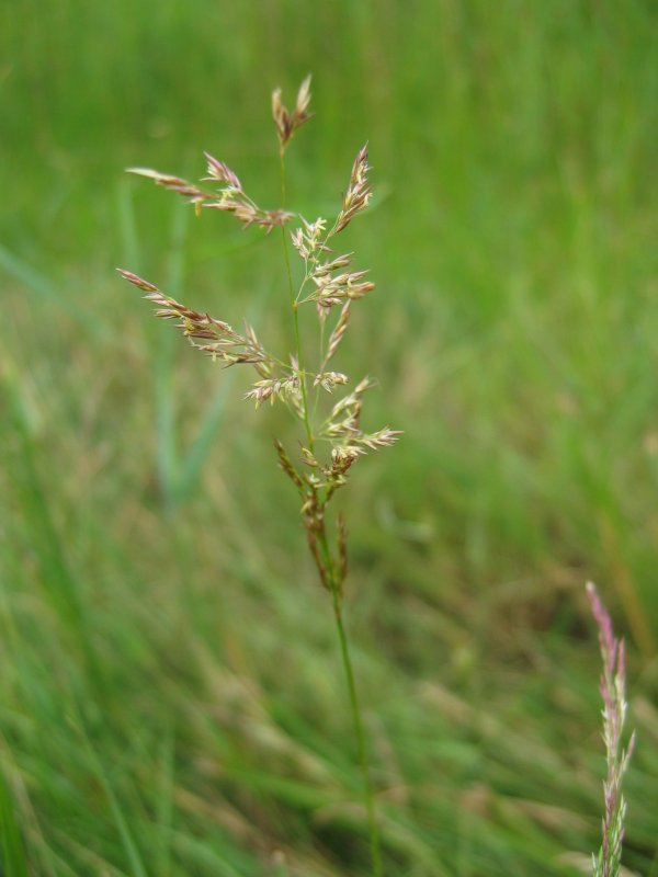 Gewöhnlicher Salzschwaden Puccinellia distans, Zingst